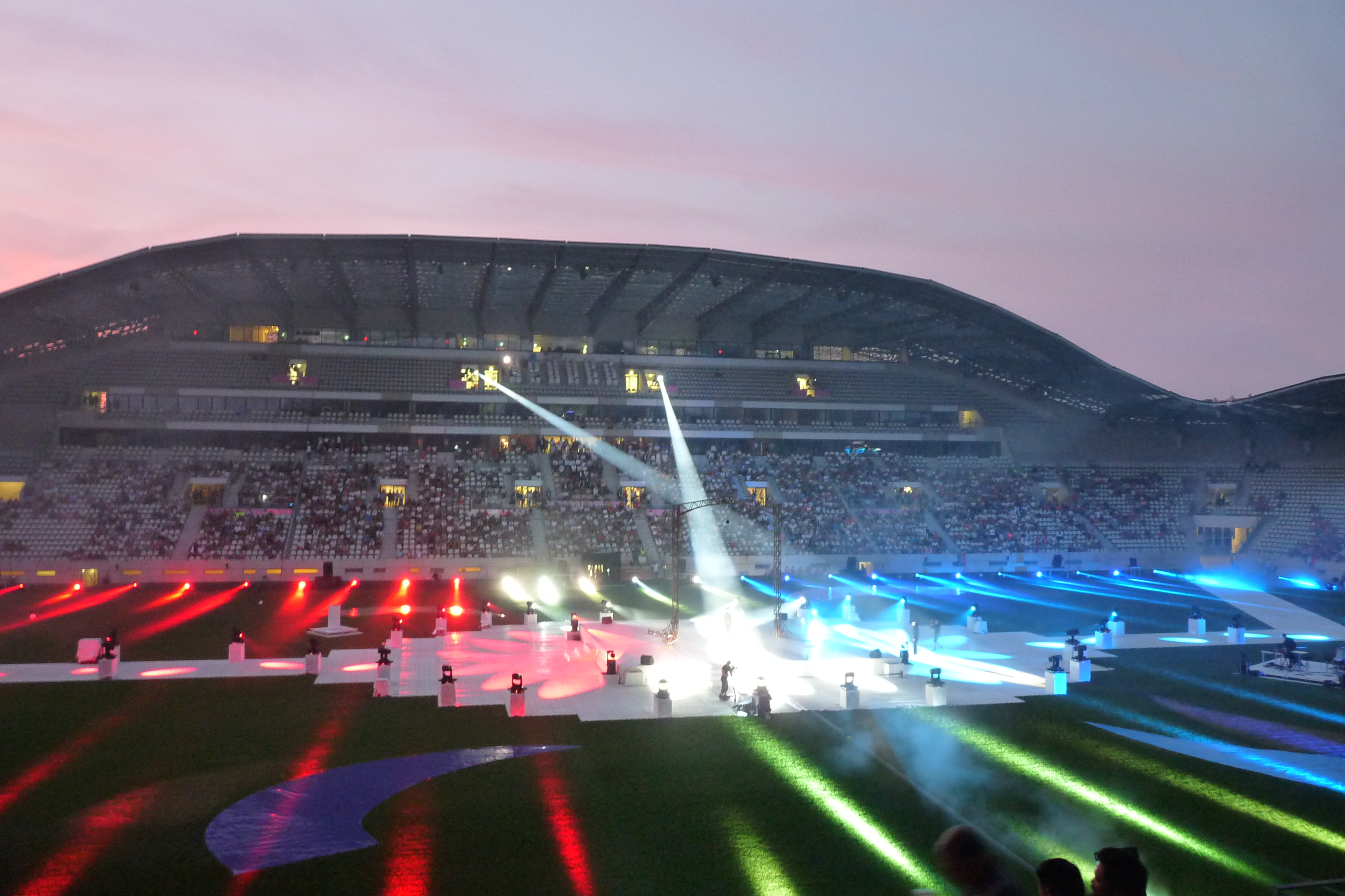 Cérémonie d'ouverture des 10ème Gay Games à Paris, stade Jean-Bouin. Lumières pendant la Marseillaise.